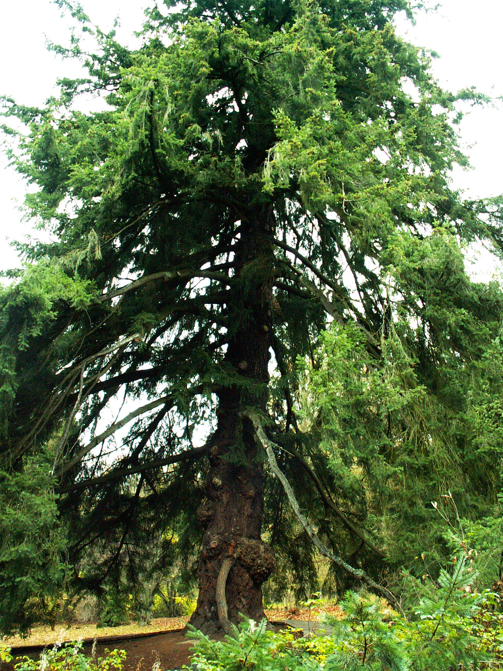 dougleska, strom